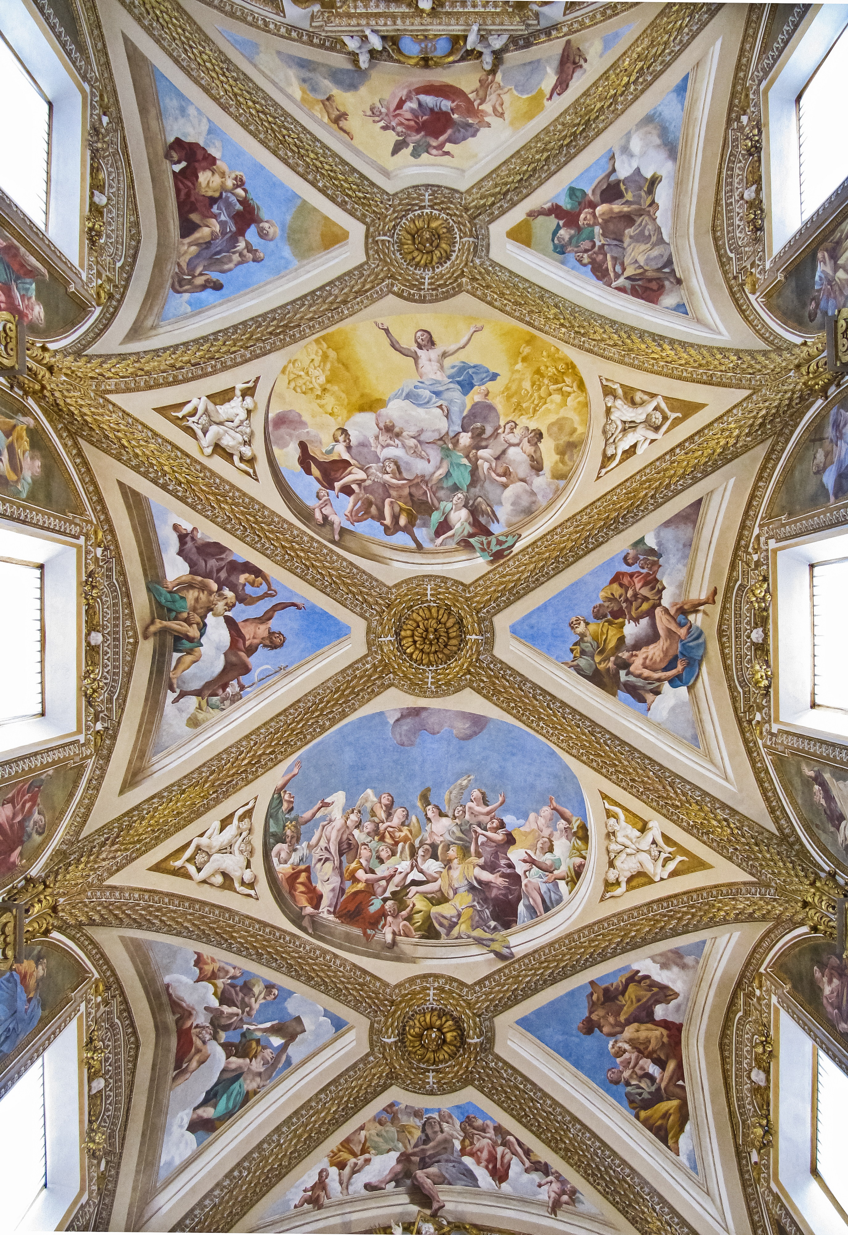 Ciclo pittorico di Giovanni Lanfranco sulla volta trecentesca della chiesa interna della Certosa di San Martino